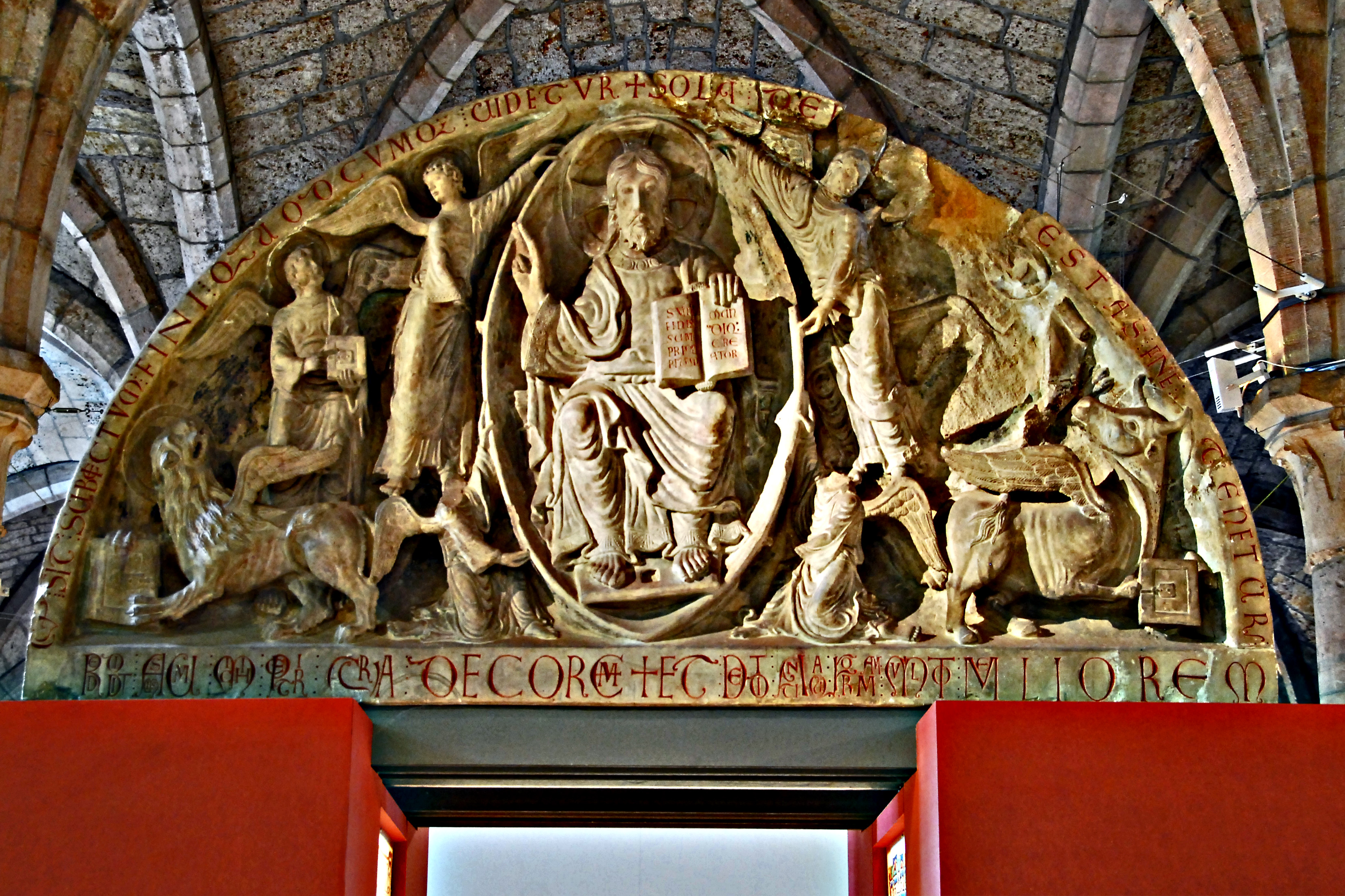 St-Bénigne,Kunstmuseum, Tympanon, Pantokrator